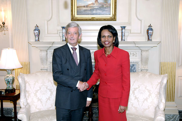 Eimert van Middlekoop and Condoleezza Rice.